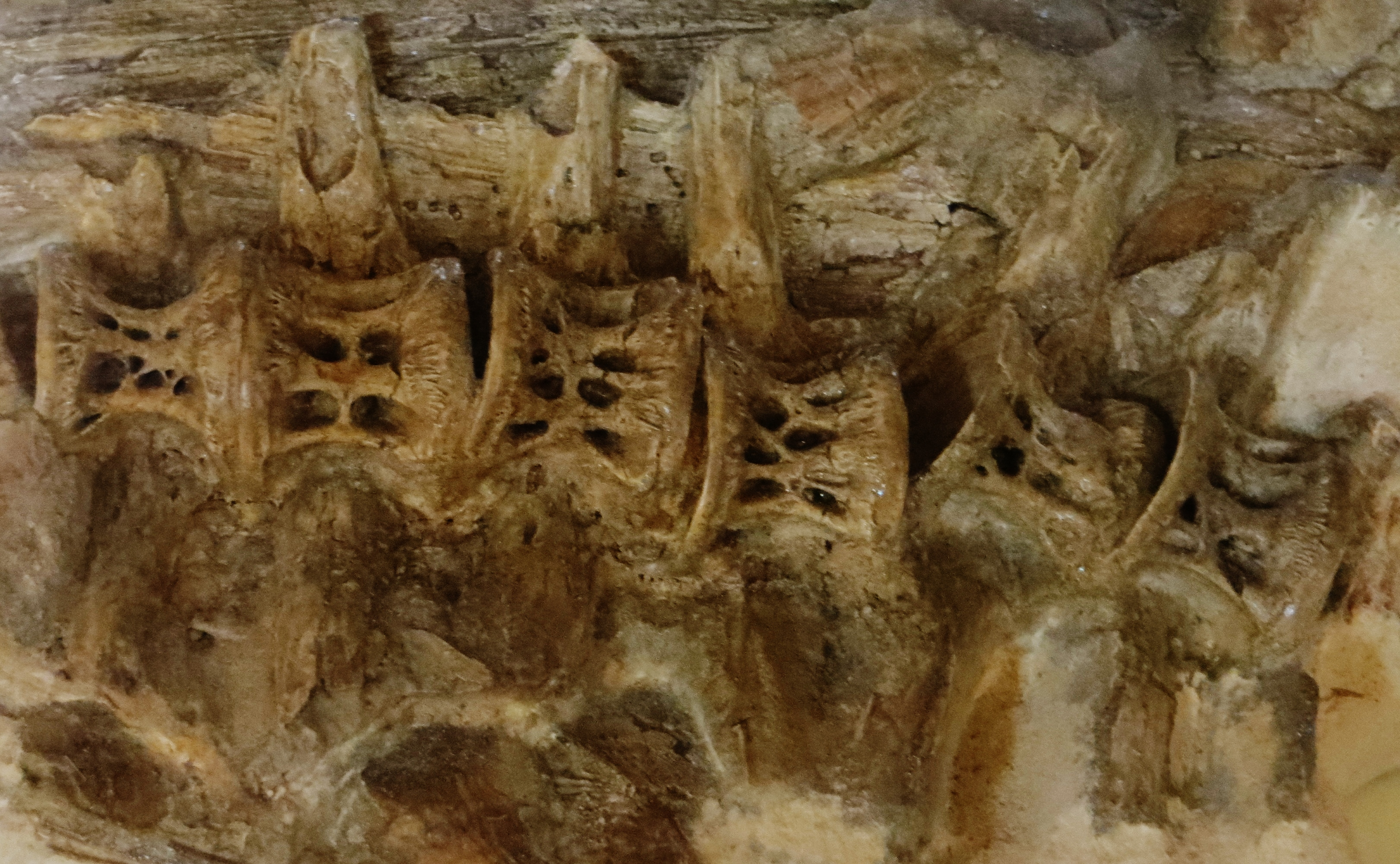 Fossil of Enchodus, an extinct fish- Took the picture at Teylers Museum, Haarlem